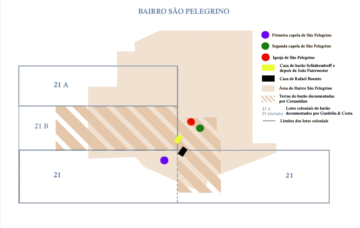 Gráfico sobrepondo a área do bairro São Pelegrino e os primitivos lotes coloniais do barão João Daniel von Schlabendorff (21 A e metade do 21, documentados por Gardelin & Costa), e área hachurada documentada por Costamilan, que pode ter sido maior do que a indicada no gráfico.